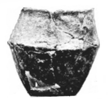 Doppelkonisches Gefäß aus dem Großsteingrab Maßlow 1